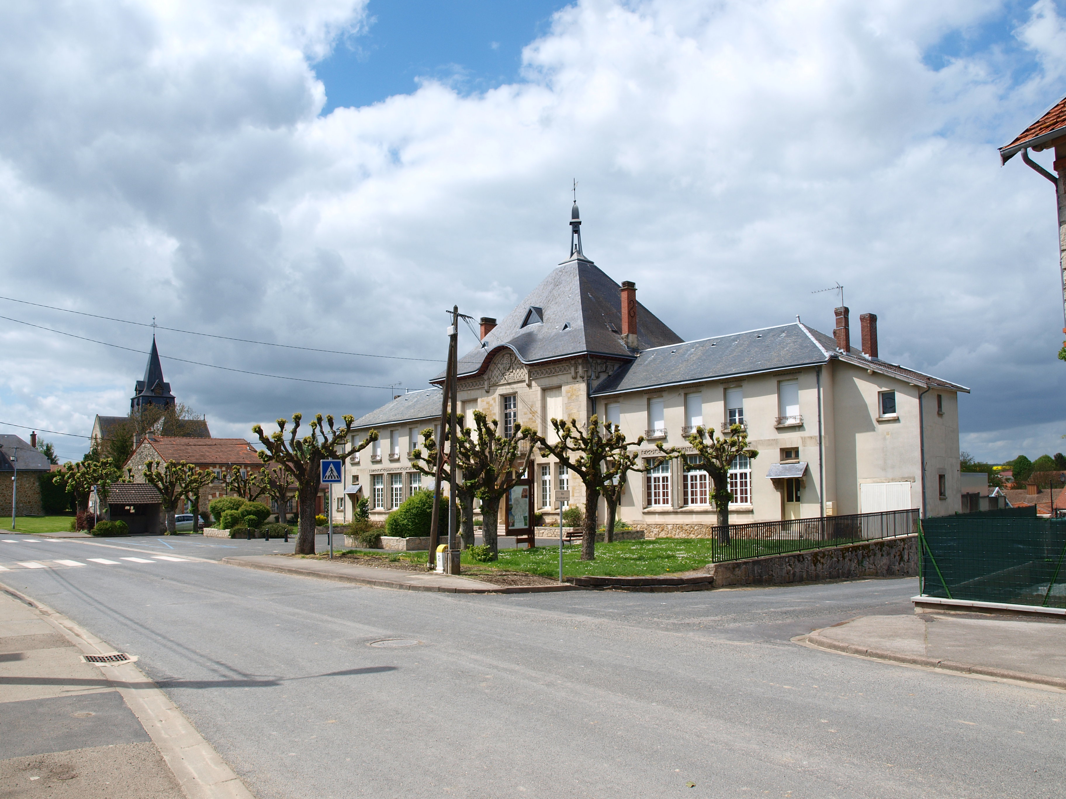 Sommepy-Tahure (Marne, France) ; la mairie-école & , au loin, l'église.